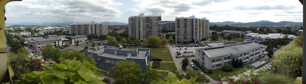 Fuzine.20070819